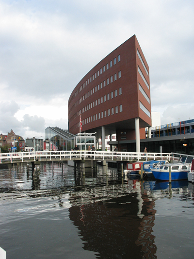 Het stadskantoor van Alkmaar. Ontwerp van de architect Bonnema Architecten. In Alkmaar staan diverse gebouwen die ontworpen zijn door Bonnema, zoals de houtskeletwoningen in de Horn en het bedrijfskantoor van het PEN, nu Nuon. De foto is gemaakt op 8 oktober 2004 door --Gerard Hogervorst 9 dec 2004 21:00 (CET)